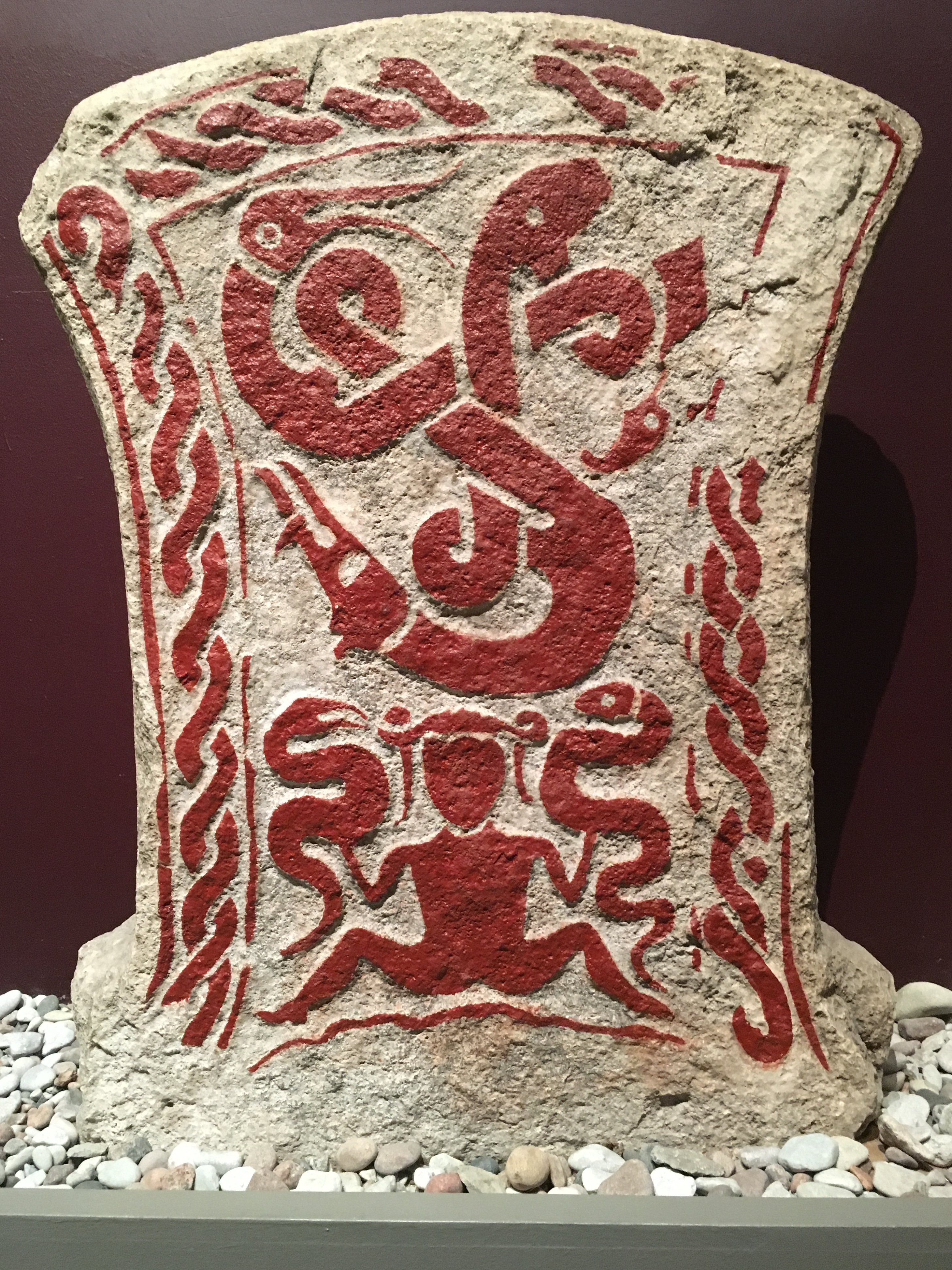 Gotland, Visby, Sverige, March 2019